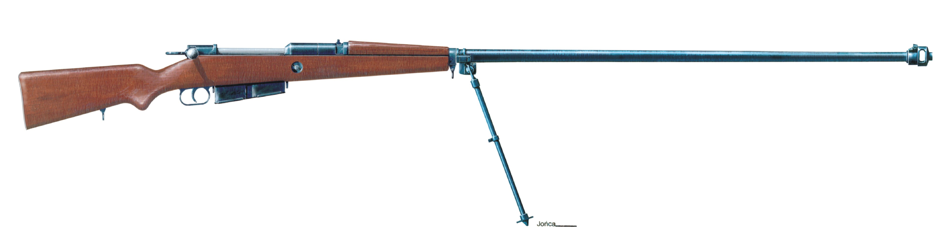 karabin ppanc. wz.35